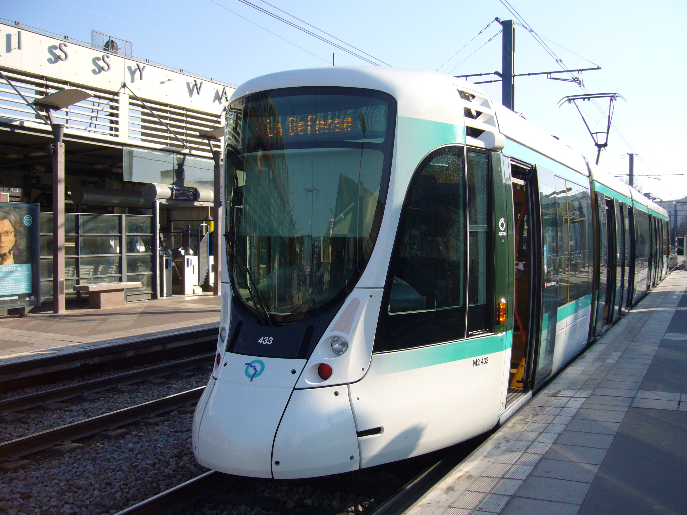 Un Citadis 302 à la station Issy Val de Seine sur la ligne 2 du tramway d'Île de France.